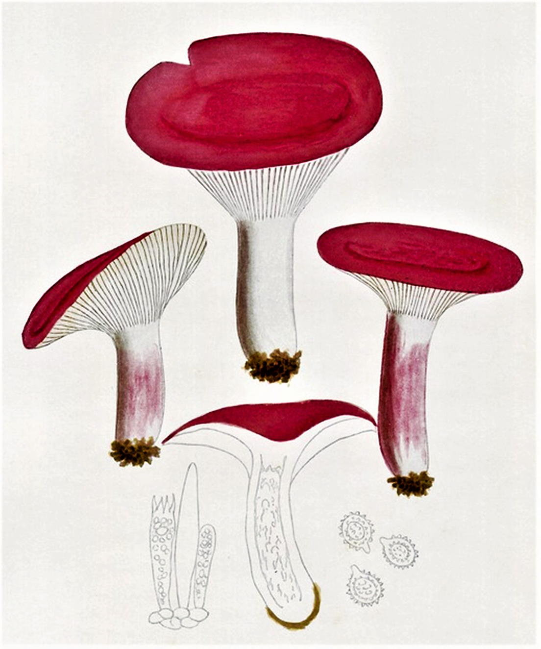 Giacomo Bresadola: Russula sanguinea (Bull., 1781) Fr. (1838)